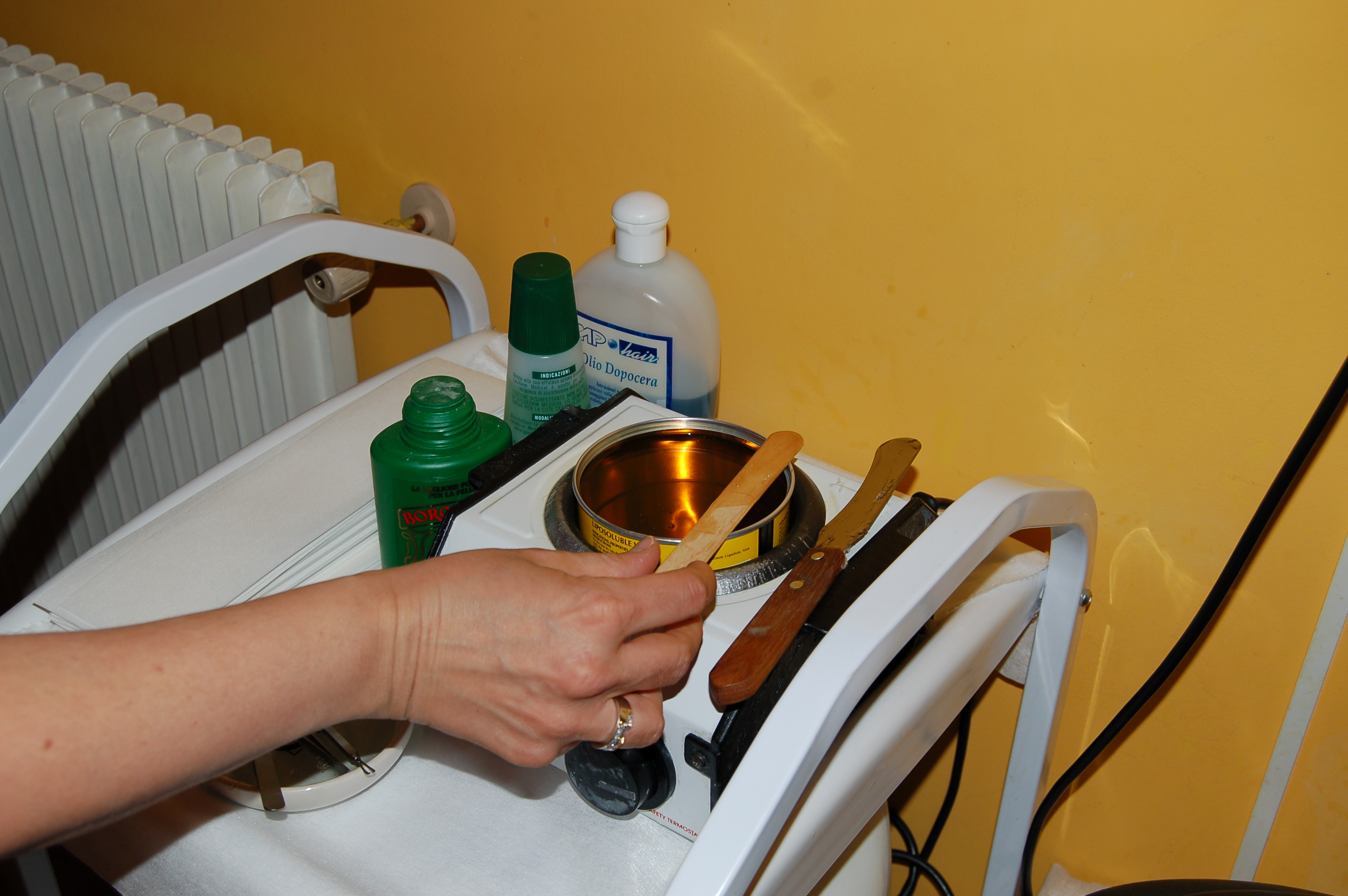 preparazione della ceretta depilatoria a caldo